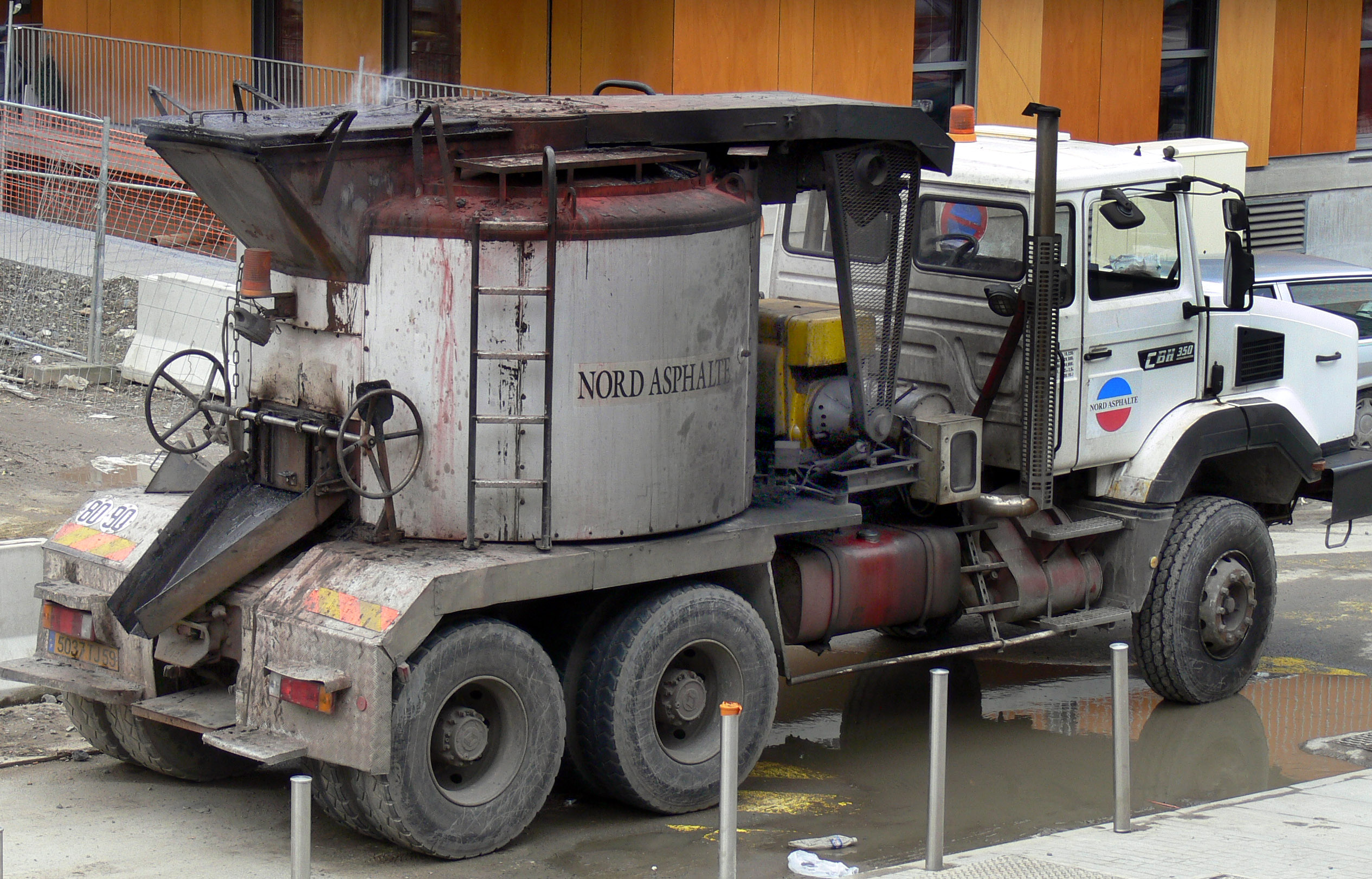 Engin de transport d'asphalte